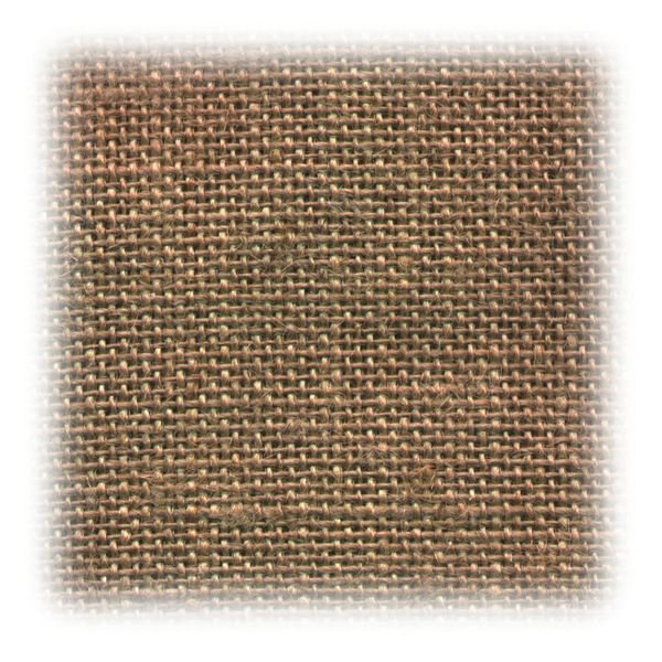 Jutegewebe